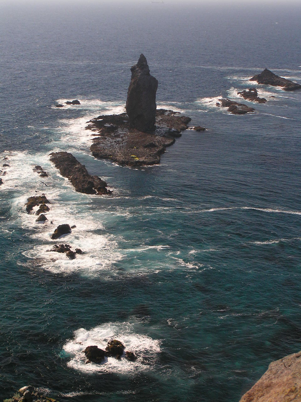 積丹半島先端